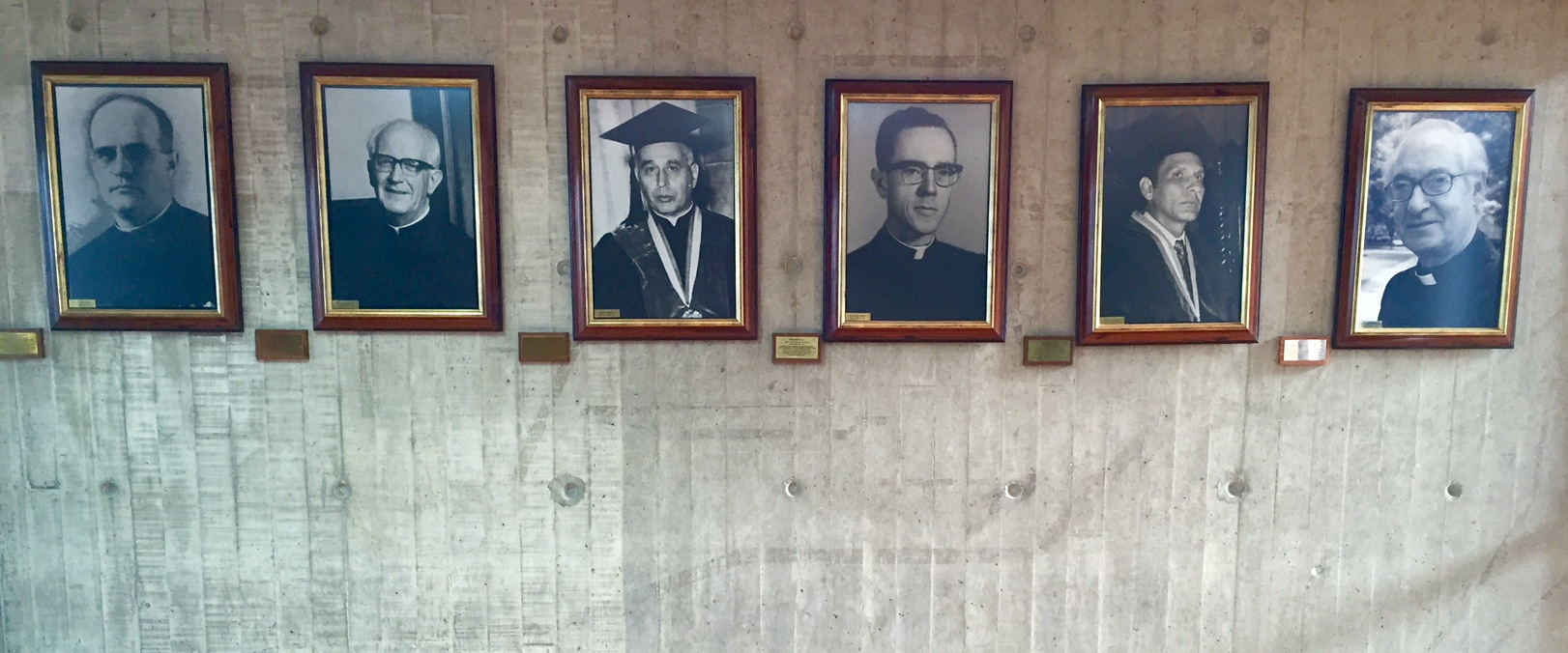 Pared con los rectores de la UCAB en el rectorado de la universidad.